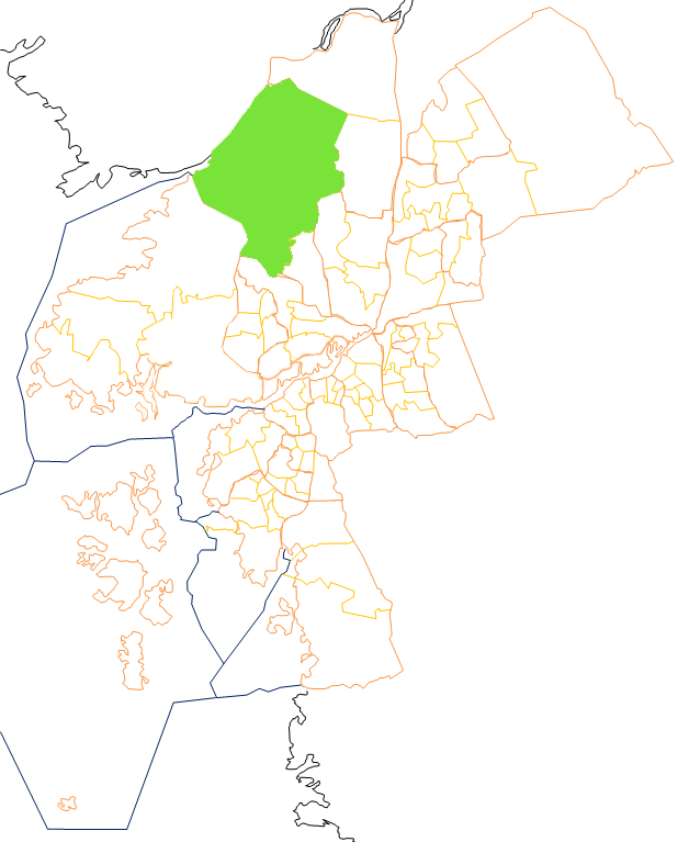 Karta som visar primärområdes belägenhet i Göteborg